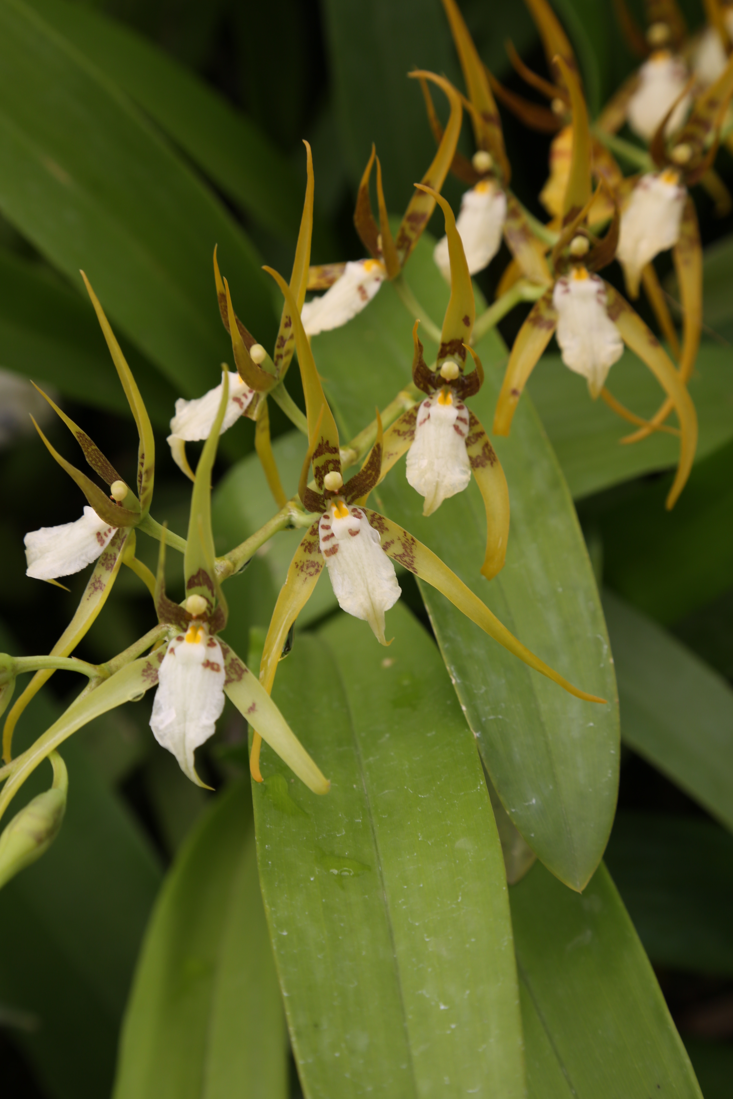 Brassia jipijapensis, Quito Botanical Garden